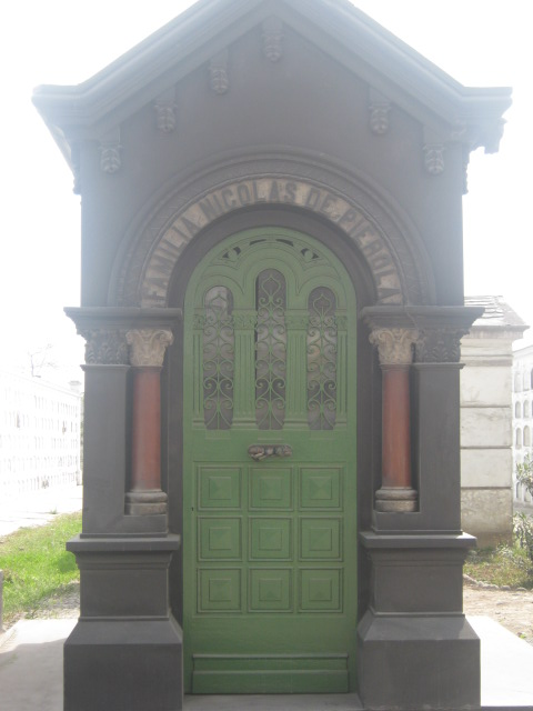 Mausoleo Nicolas de Pierola